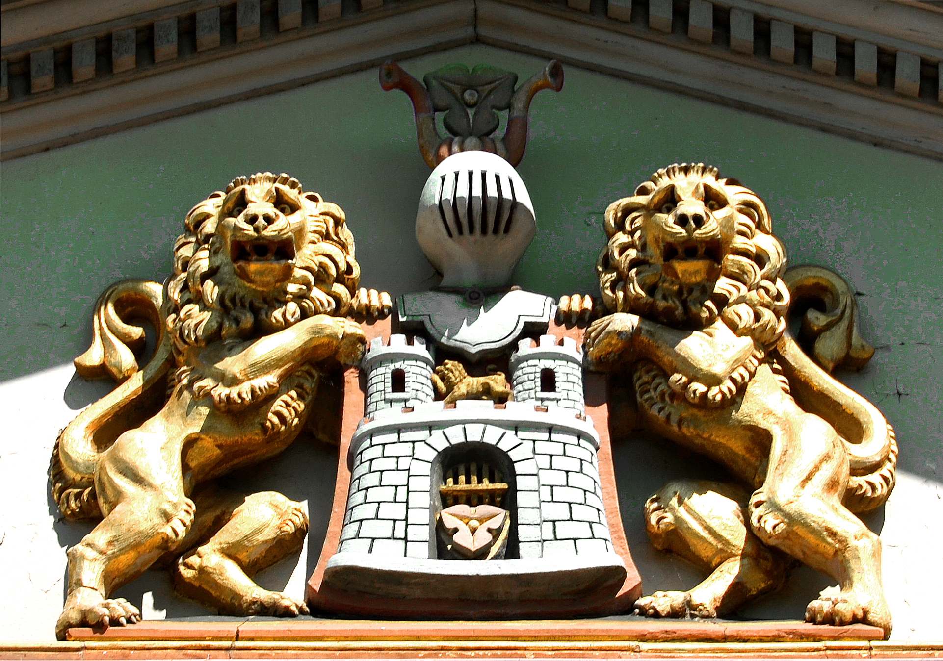 Das Wappen der Stadt Hannover wurde von der bis 1861 neu erbauten Brückmühle und nach deren Abbruch im Jahr 1950 an das Wangenheimpalais versetzt ...